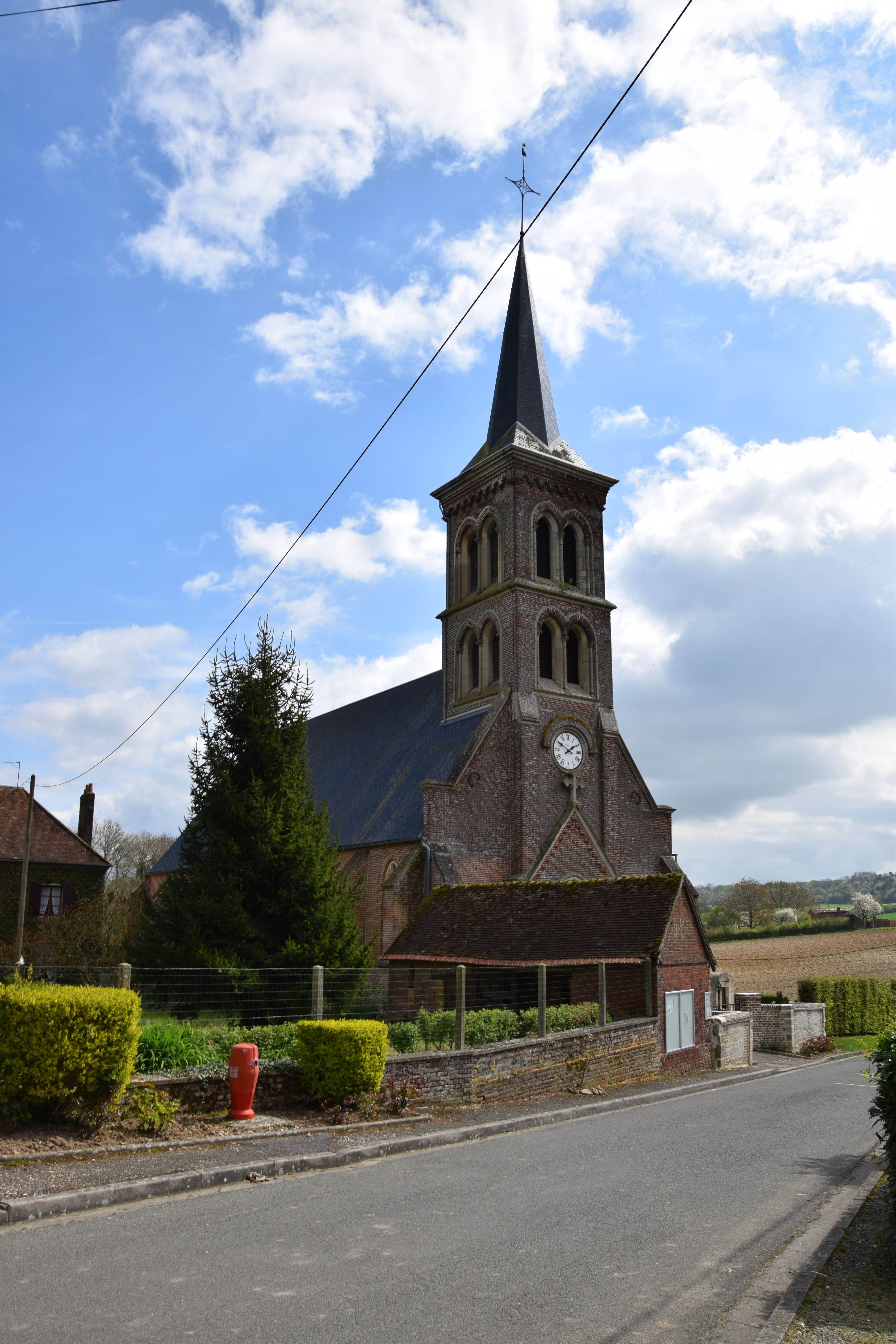 Espaubourg